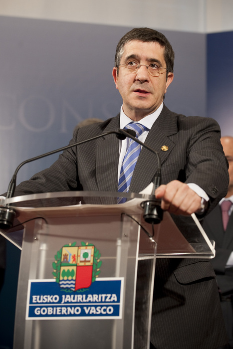 Gobierno Vasco. El 4 de mayo de 2010, el Gobierno Vasco celebró su Reunión de Gobierno en el Palacio Artaza de Lejona-Leioa.